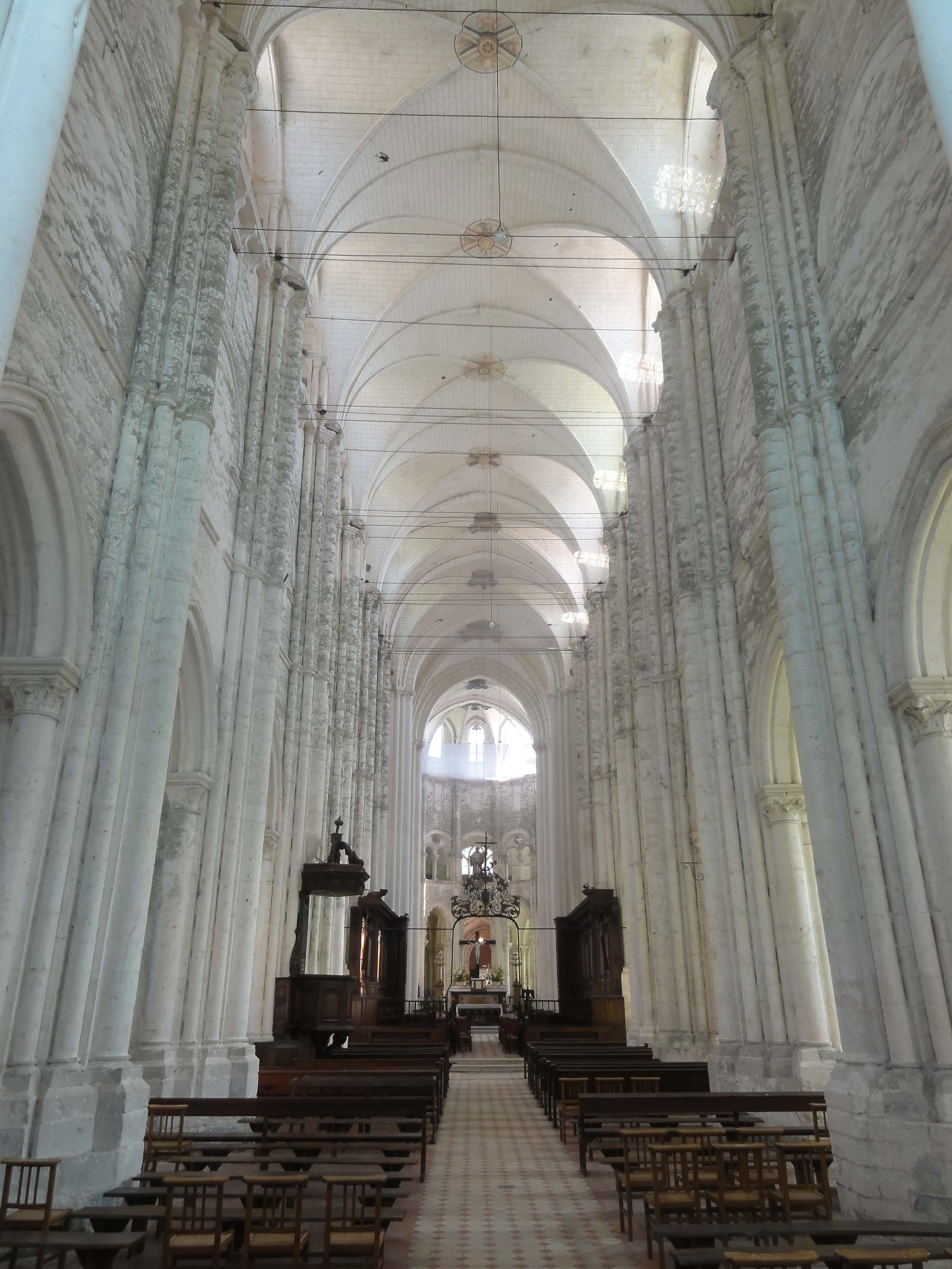 Nef, vue vers l'est.